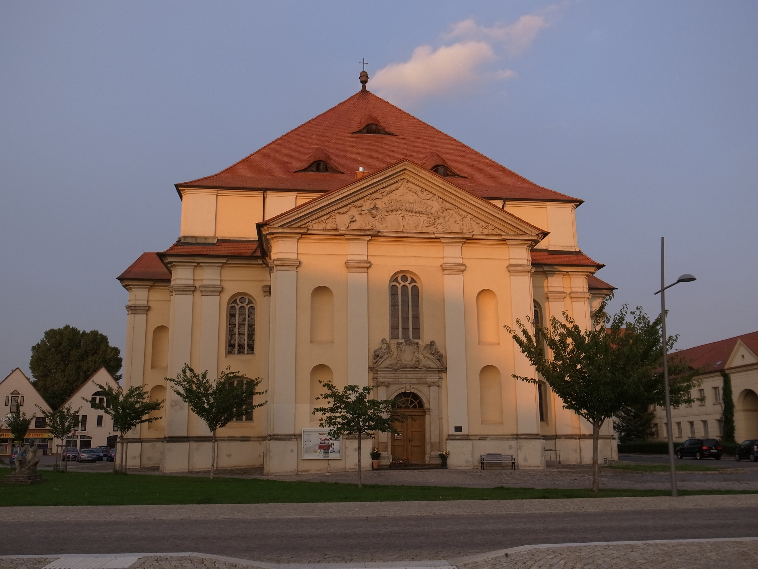 Zerbst, St.Trinitatiskirche 1683 bis 1690 Bau der Kirche für die Lutheraner nach Plänen des Baumeisters Cornelis Ryckwaert 1945 stark beschädigt und ausgebrannt Wiederaufbau bis 1954 (Quelle: Text von der Informationstafel an der Kirche übernommen)